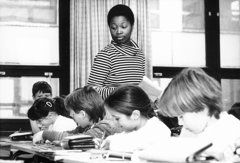 Güstrow, Pädagogikstudentin aus Mocambique ADN-ZB/Pätzold/11.6.86/Bez. Schwerin: Zum Tag des Lehrers/ Pädagogik-Studentin Esperanca Mutimba, eine junge Frau aus Mocambique, beendet derzeit ihr Studium an der Pädagogischen Hochschule Güstrow mit einem mehrwöchigen Praktikum. In der Klasse 5a der Güstrower Artur-Becker-Oberschule gibt sie Mathematik-Unterricht. Nach der Verteidigung ihres Diploms wird die Mathematik-Fachlehrerin in ihre Heimat zurückkehren. In Güstrow bereiten sich weitere Mocambiquer, Jemeniten und Afghanen auf eine künftige Tätigkeit als Lehrer in naturwissenschaftlichen Fächern vor.